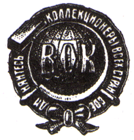 Эмблема Всероссийского общества коллекционеров (филателистов)